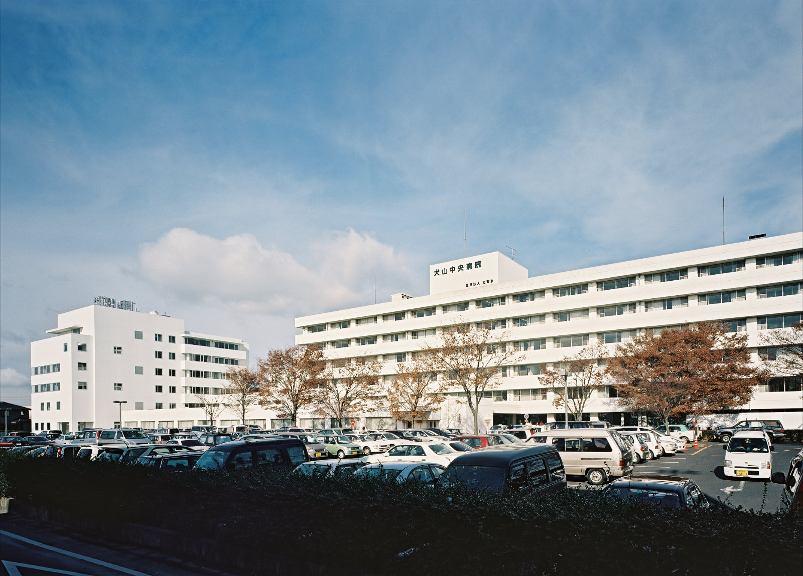 総合犬山中央病院全景